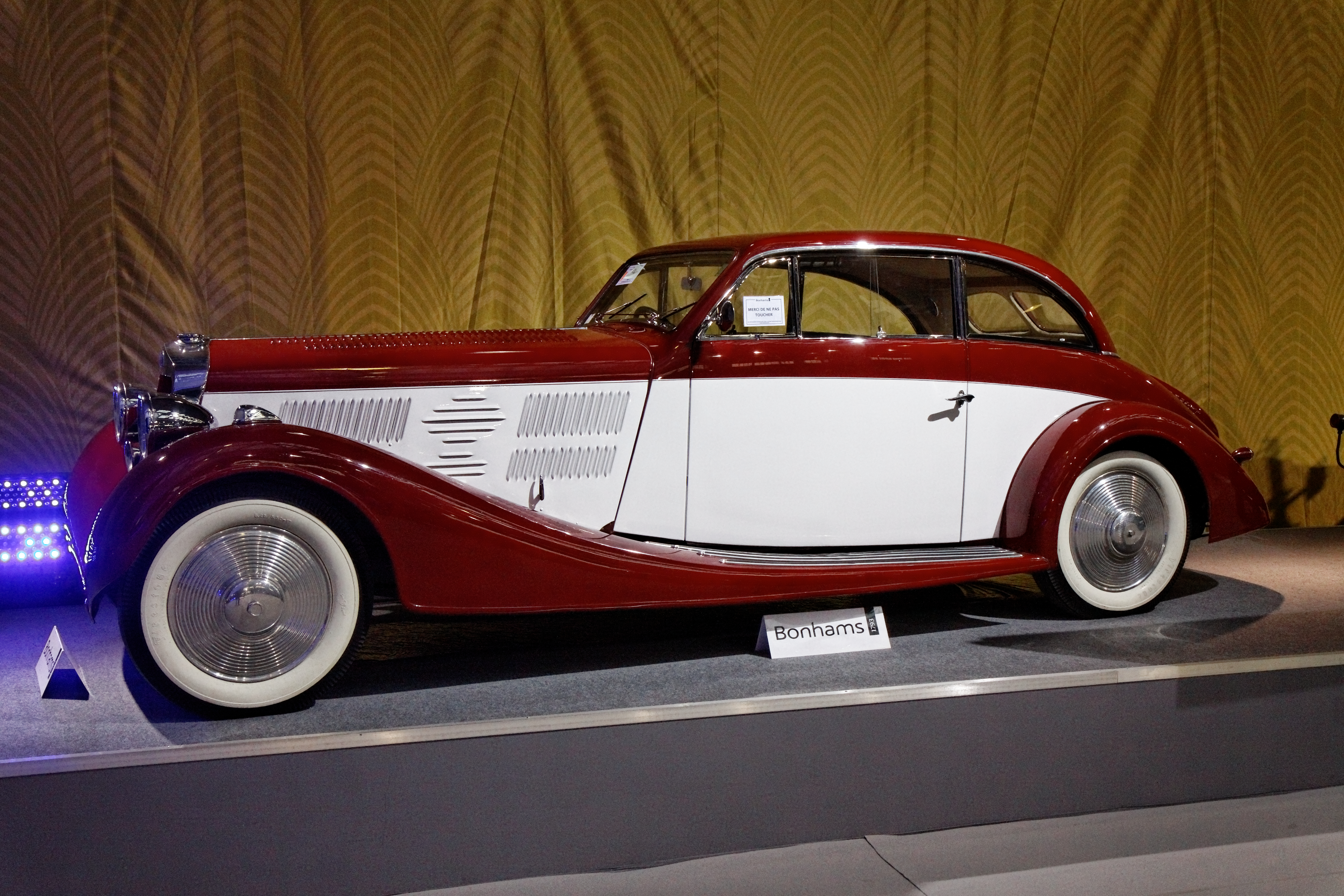 Delage D8-105 Sport Coupé